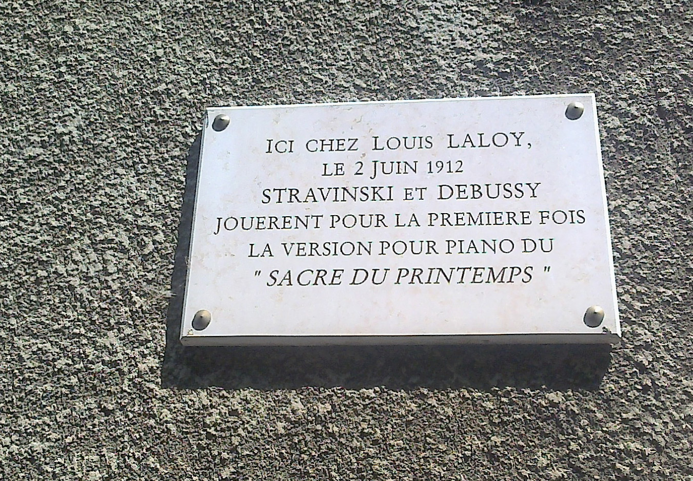 Plaque apposée avenue Marcellin Berthelot à Meudon Sacre du Printemps; Stravinski; Debussy